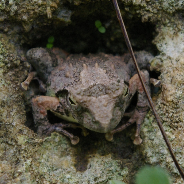 リュウキュウカジカガエル（琉球河鹿蛙、Buergeria japonica）